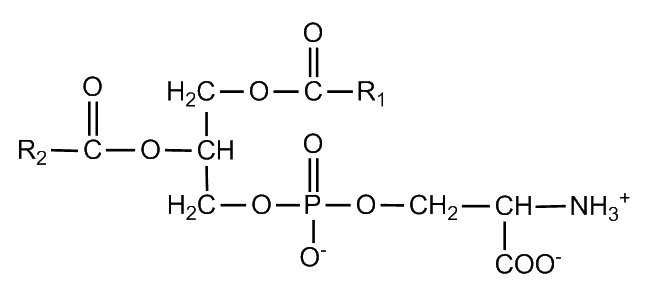 Formule semi-développée de la Phosphatidylsérine.